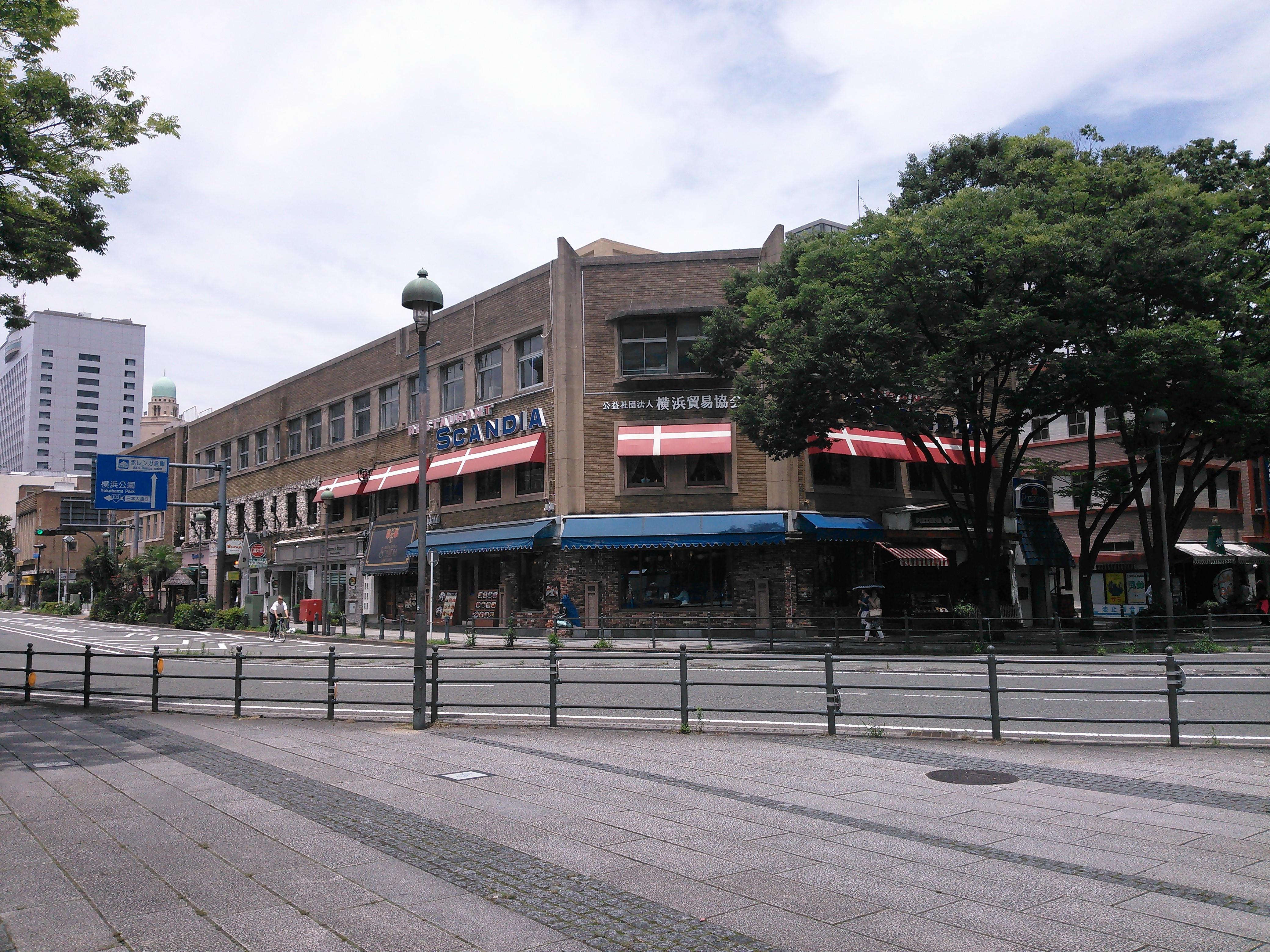 横浜市中区、横浜貿易会館